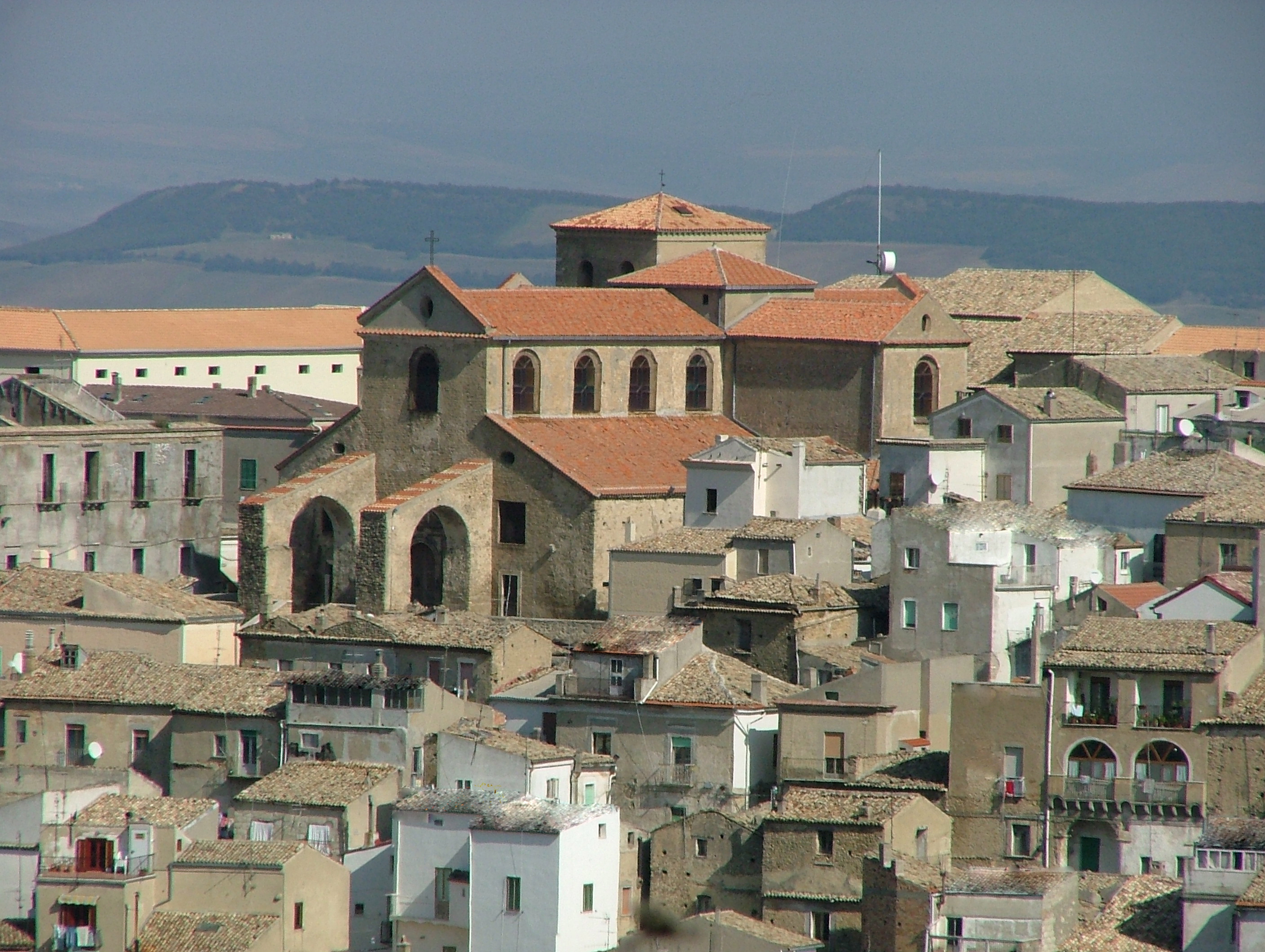 Foto Rocco Stasi - Cattedrale di Tricarico, di originario stile romanico poi modificata nel '600, con l'ampliamento dell'edificio sulle navate laterali e con la collocazione dei due archi di sostegno sulla sua facciata. Pubblico dominio, fatta da me